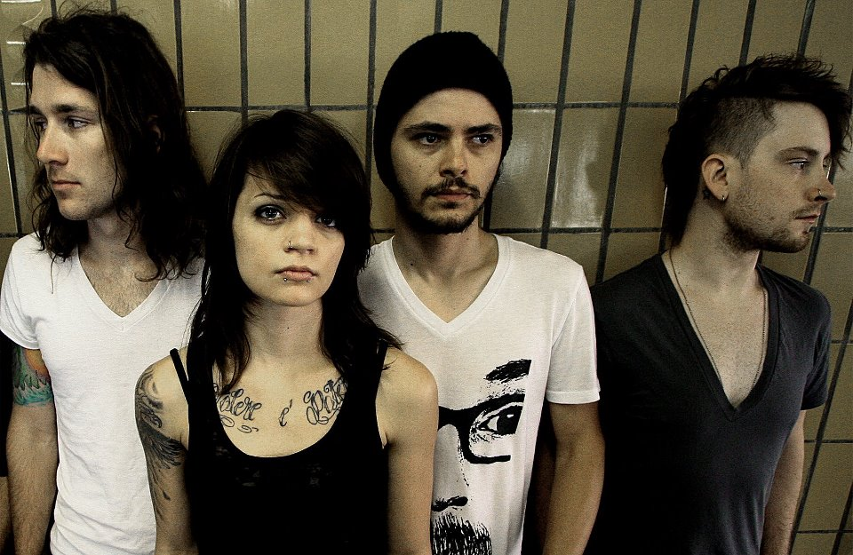 Fit For Rivals en vivo